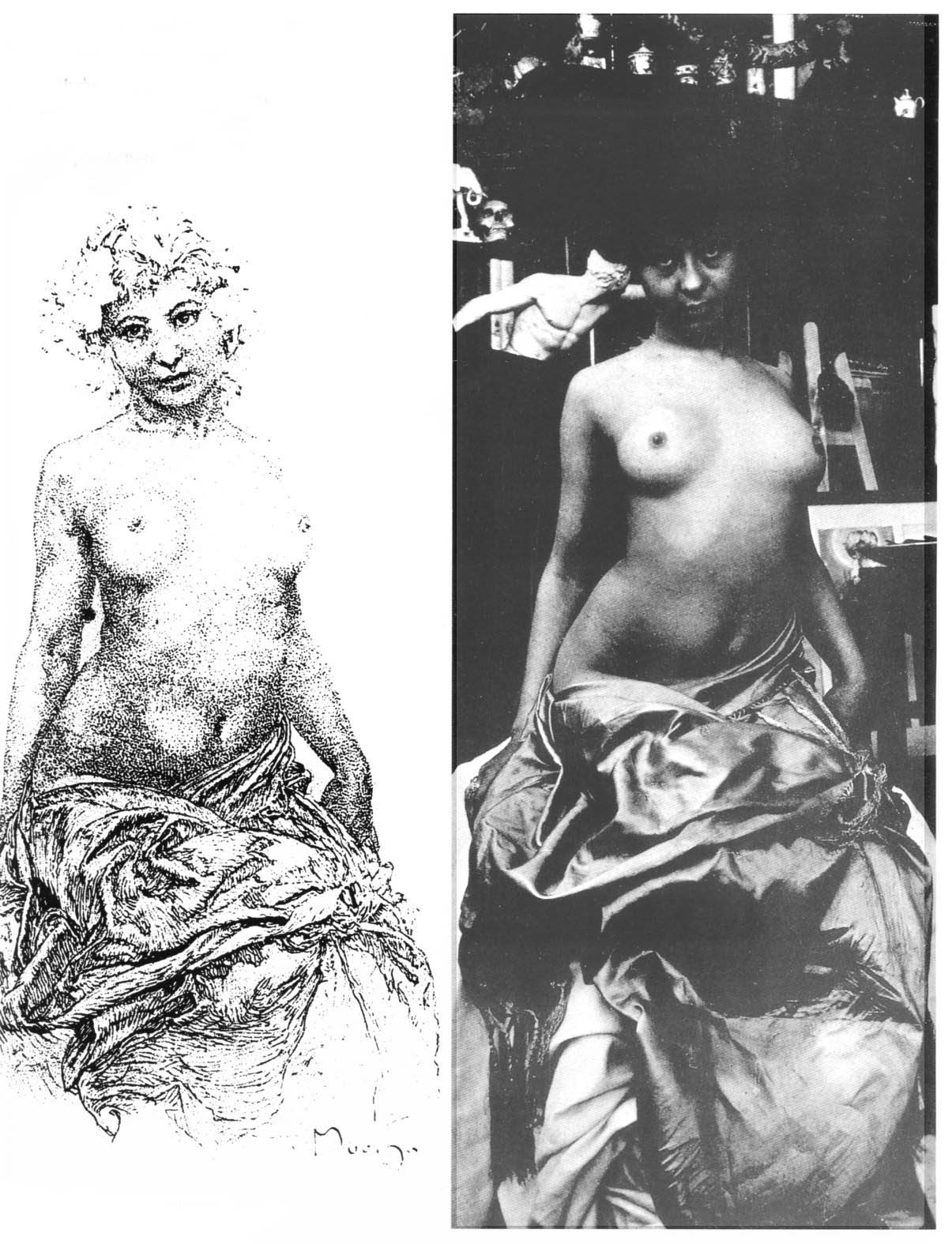 Fotografía de modelo y dibujo basado en la fotografía, de Alfons Mucha (1928).